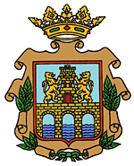 Escudo de Aranda de Duero